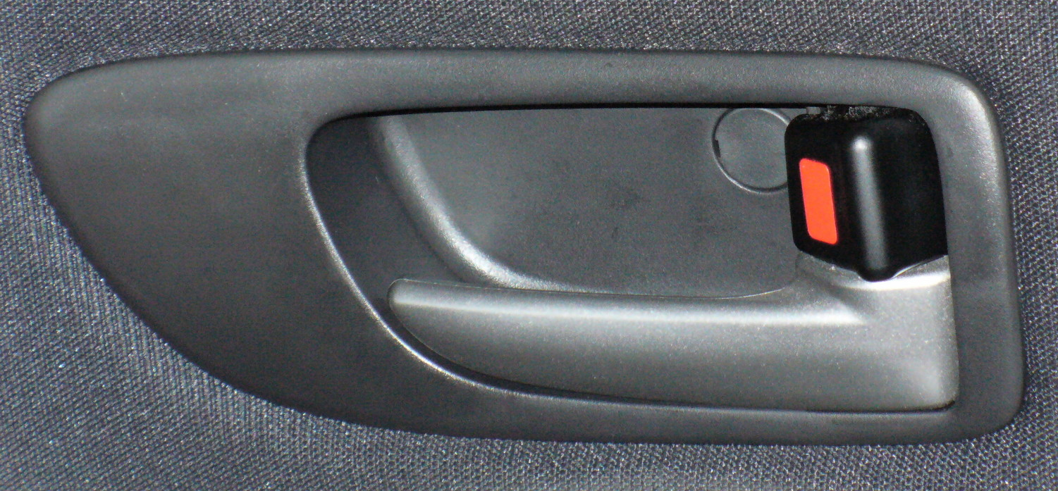 Türverriegelung